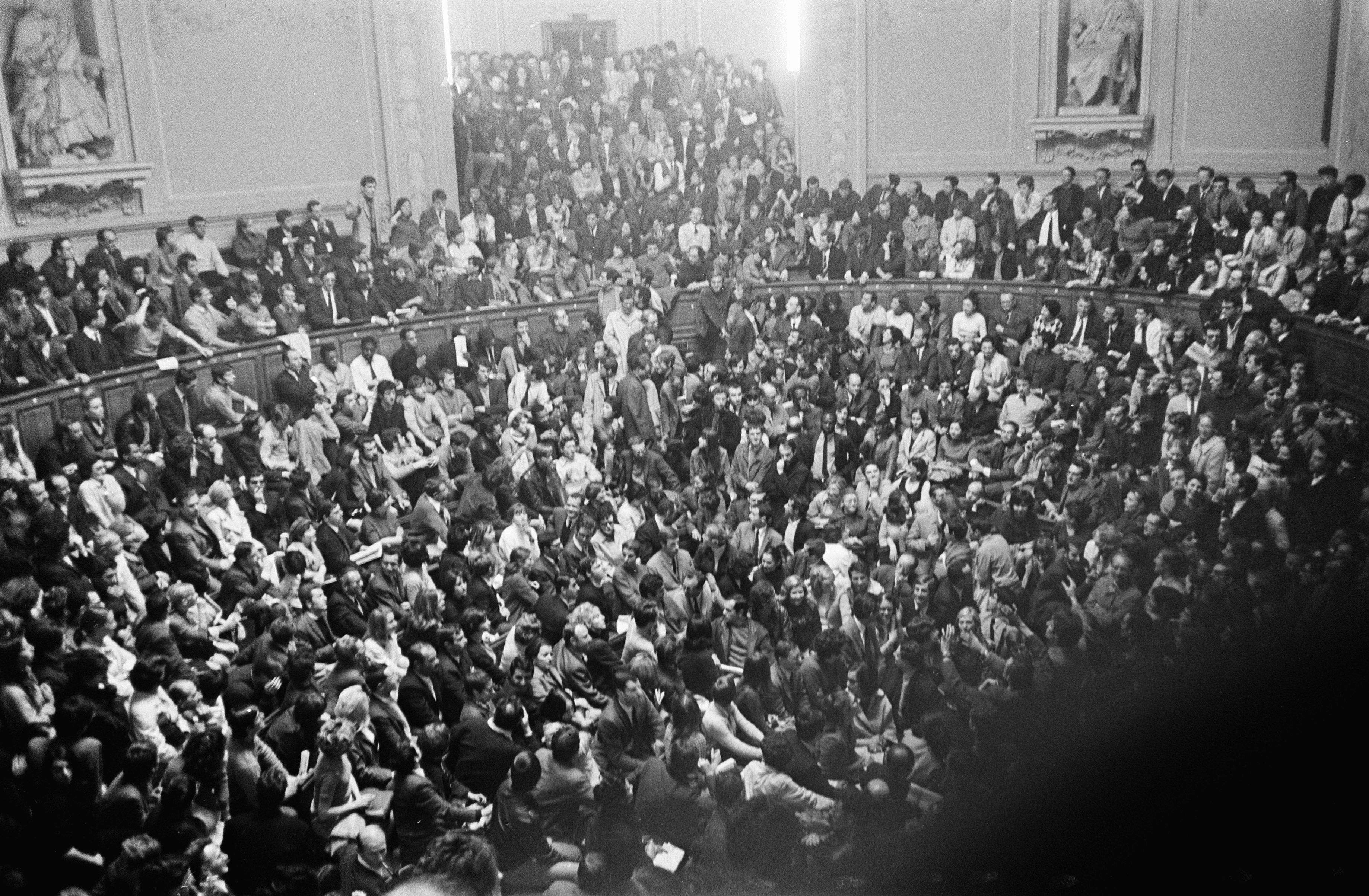 Collectie / Archief : Fotocollectie Anefo Reportage / Serie : [ onbekend ] Beschrijving : Frankrijk. Sorbonne bezet door studenten Datum : 28 mei 1968 Locatie : Frankrijk Trefwoorden : STUDENTEN, bezettingen Instellingsnaam : Sorbonne Fotograaf : Koch, Eric / Anefo Auteursrechthebbende : Nationaal Archief Materiaalsoort : Negatief (zwart/wit) Nummer archiefinventaris : bekijk toegang 2.24.01.05 Bestanddeelnummer : 921-3968